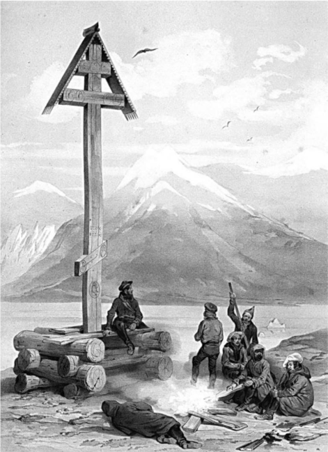 Моряки французского корвета "Решерш" у креста, поставленного русскими поморами. Литография Огюста Майера (1838). Музей "Помор", Баренцбург, Шпицберген